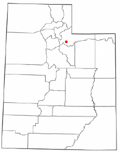 Localización de Oakley, Utah